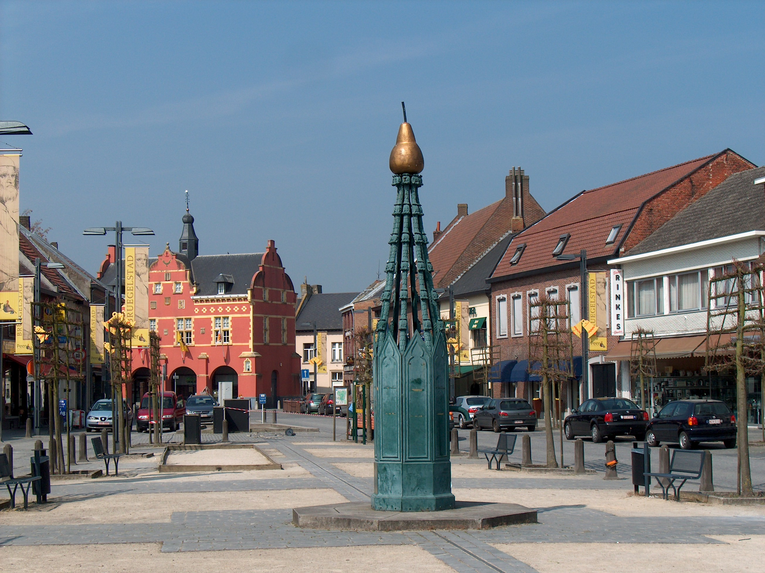 Le centre de Peer